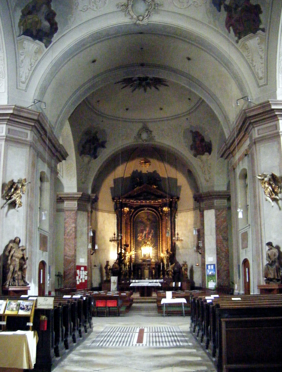 wien 389